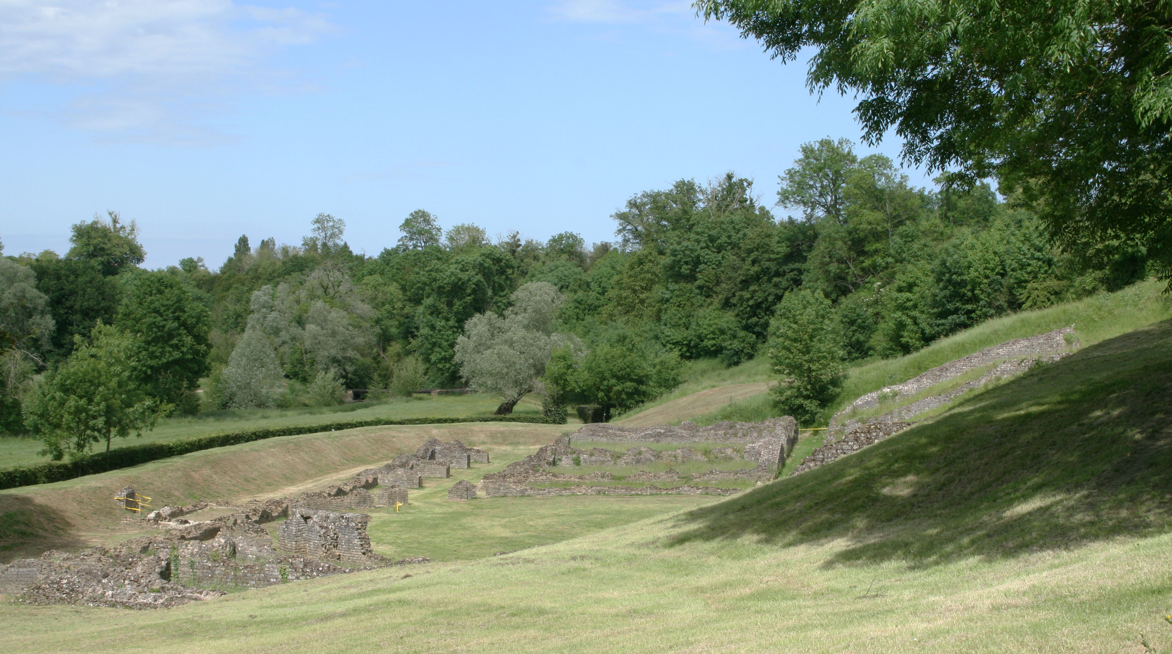 Theatre romain à Sanxay